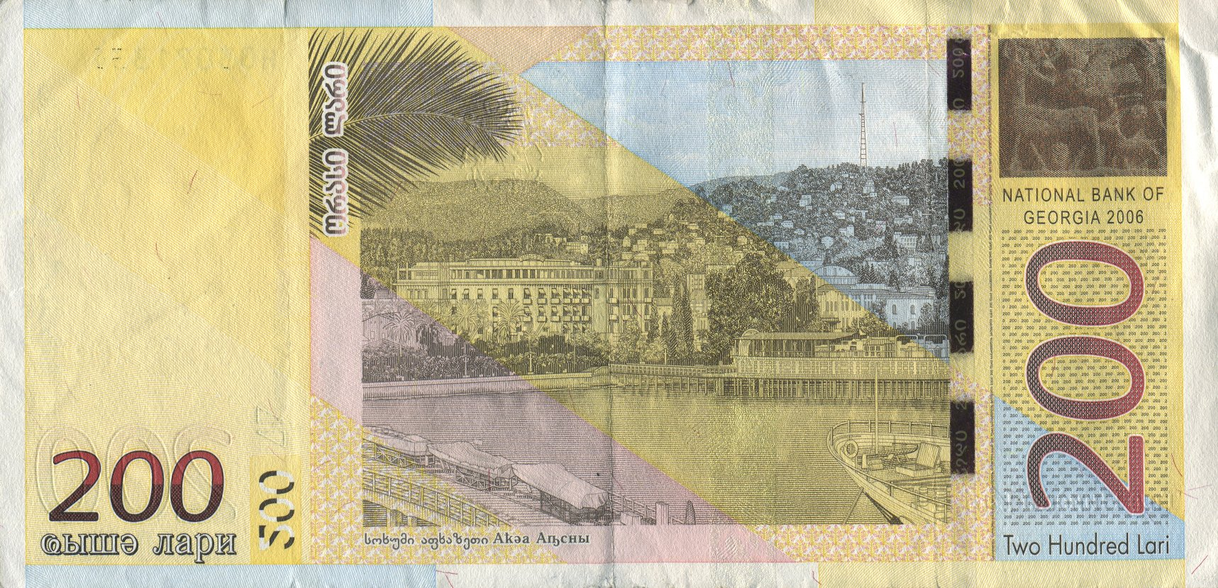 200 Georgian lari (Reverse)